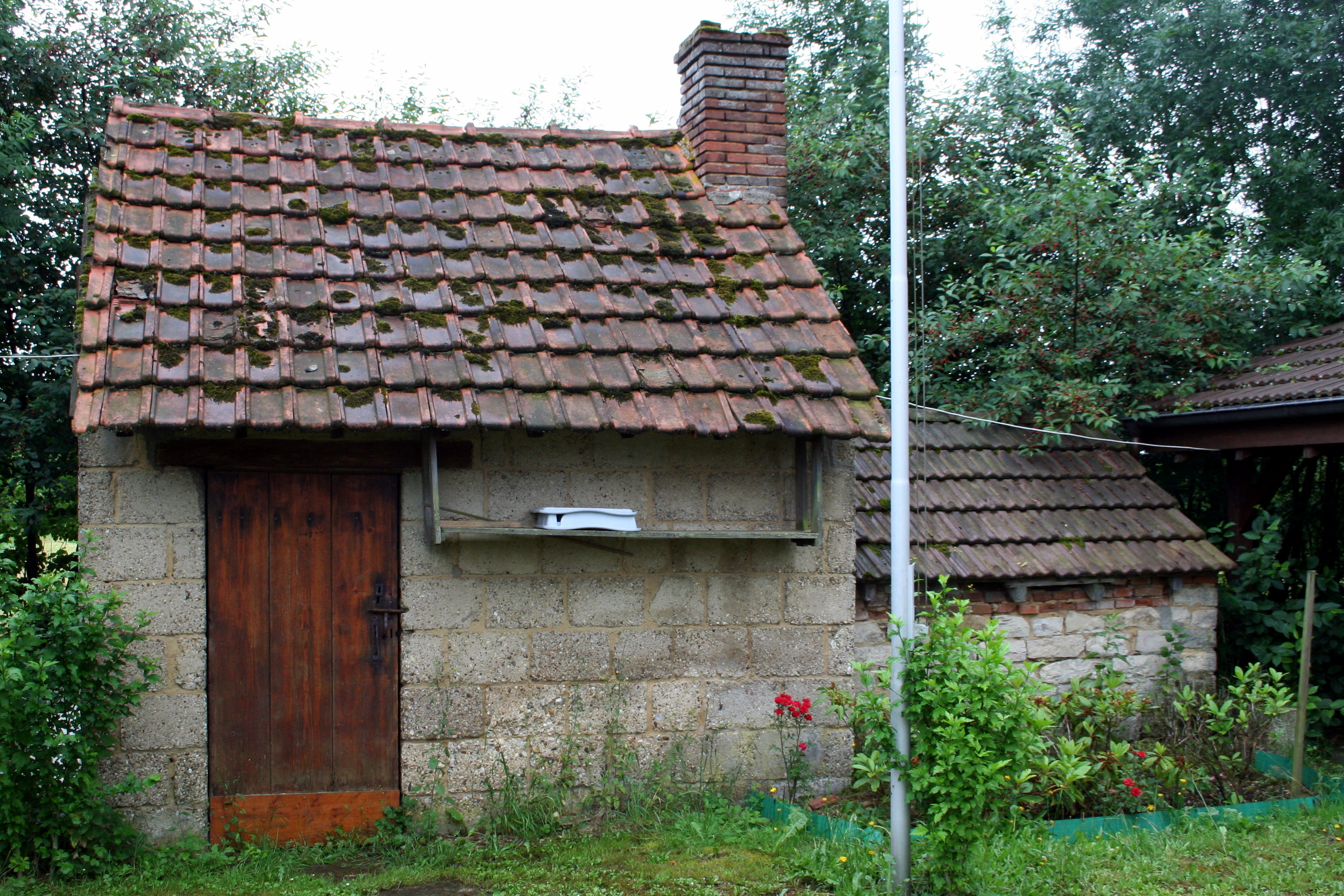 Backhaus beim Bressehaus in Bellevesvre